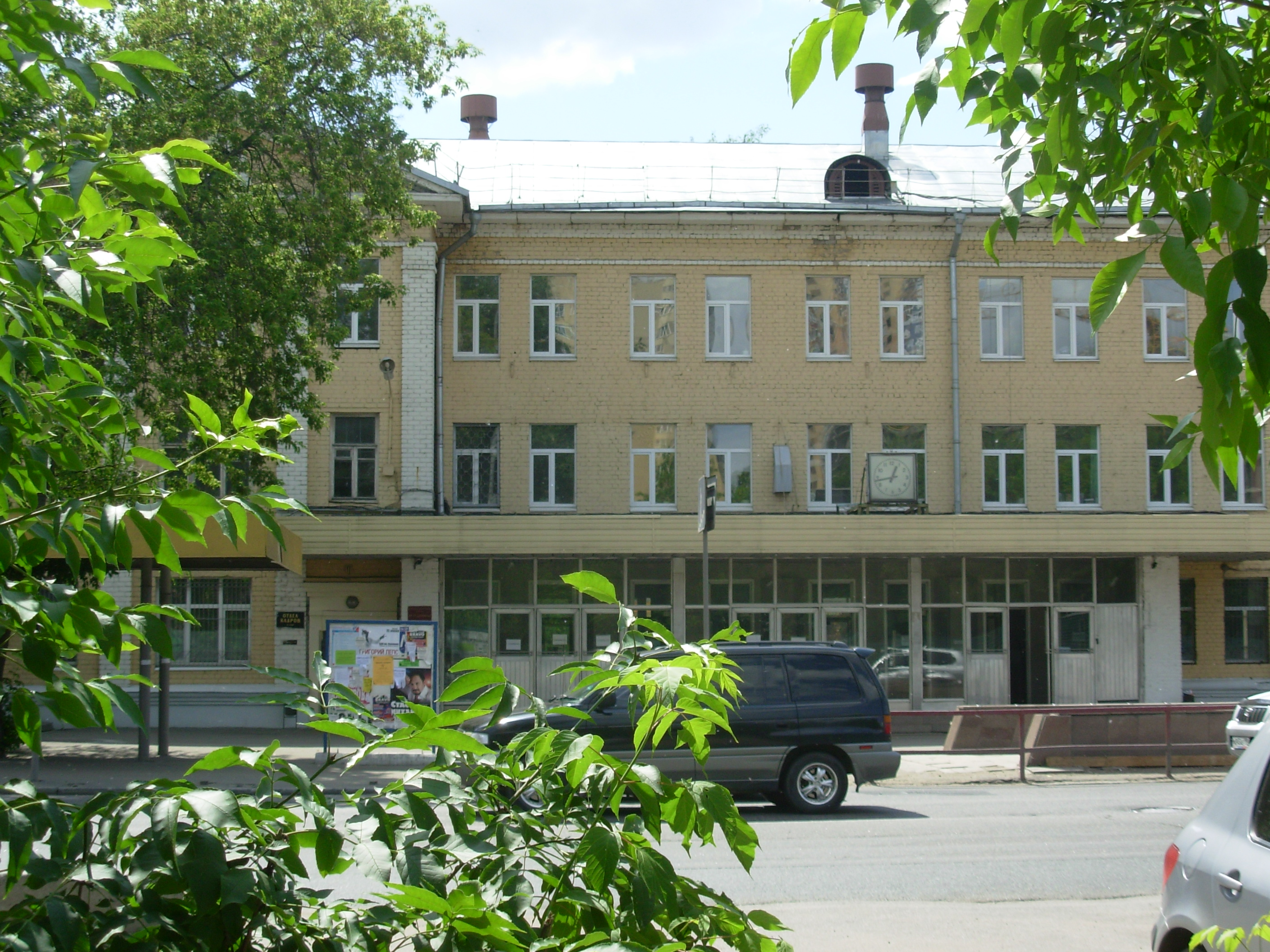 Город Королёв, улица Пионерская, дом 4, вход в ЦНИИМаш